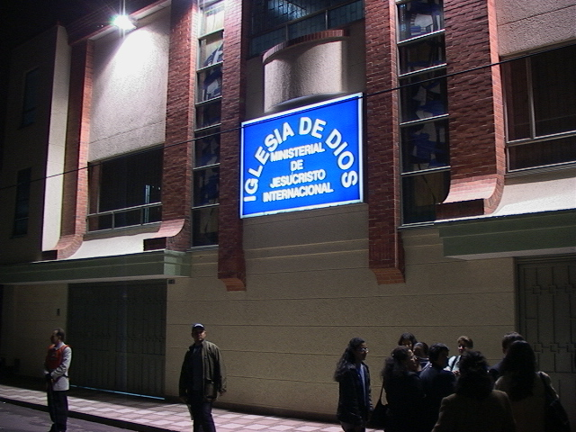 Fachada de la iglesia de Las Ferias.